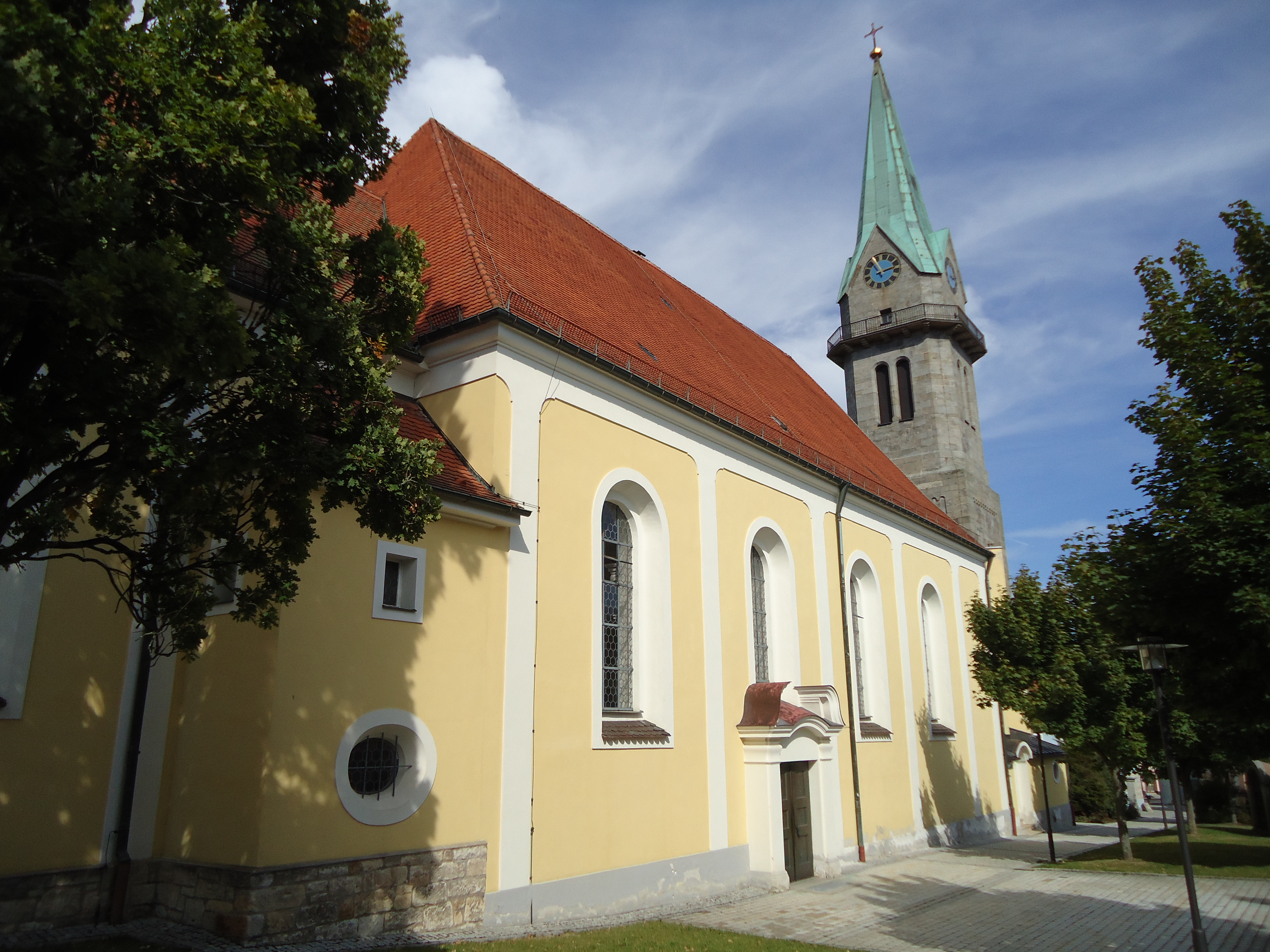 Pfarrkirche Mariä Himmelfahrt in Erbendorf